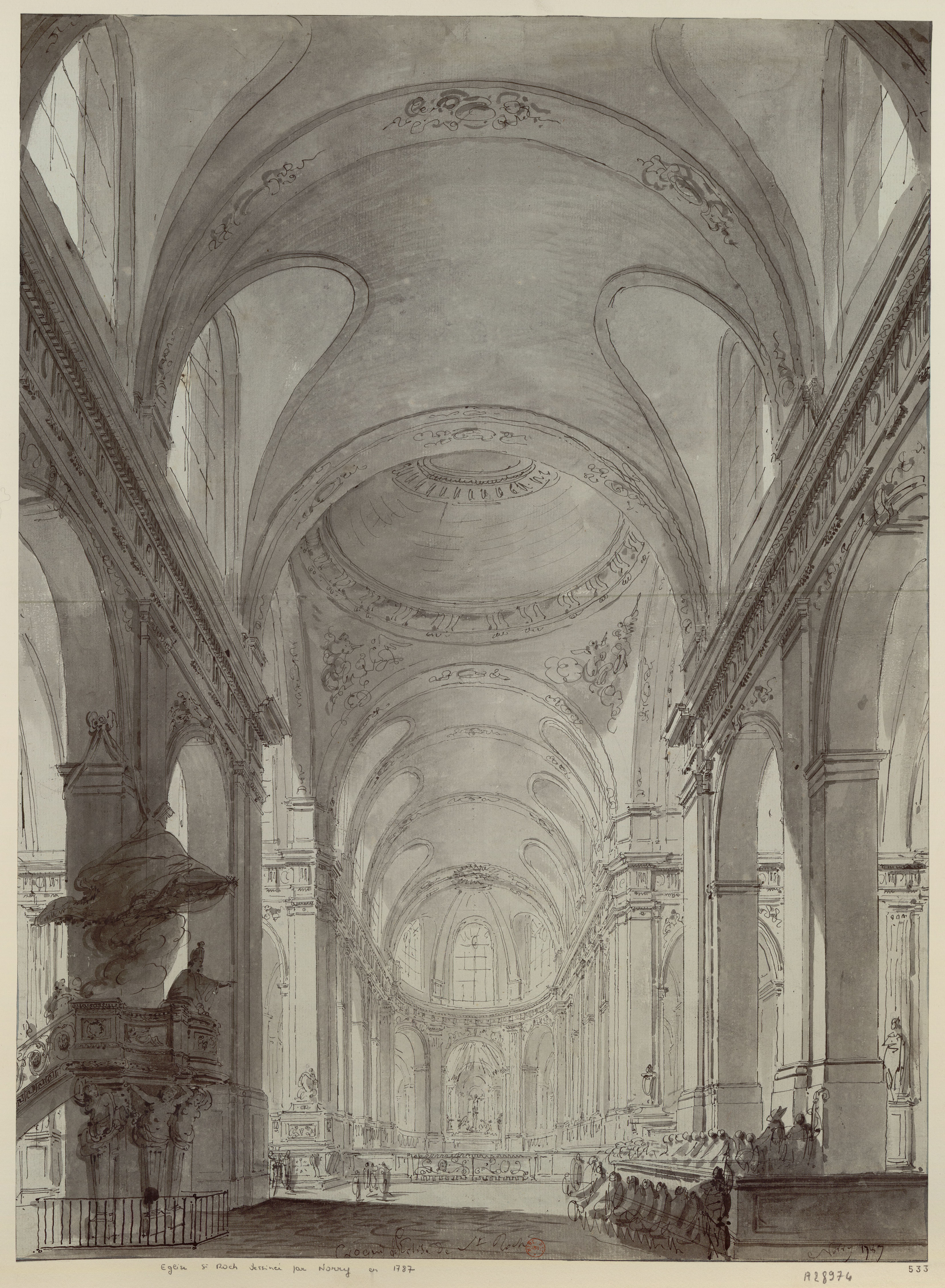 Croquis de l'Église de St Roch, 1653-1787.